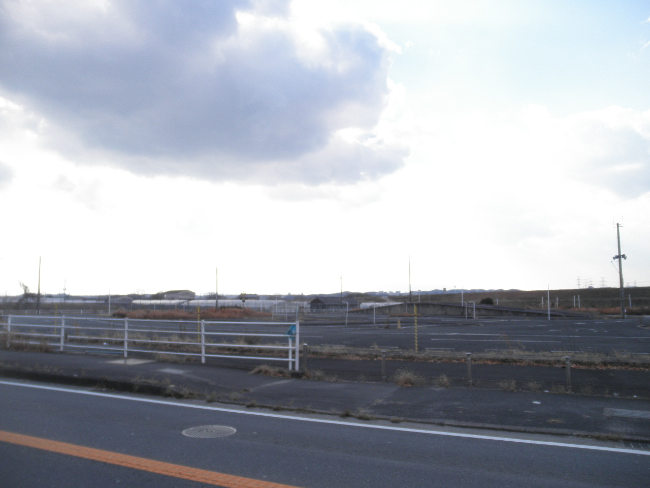 旧・宝池城南自動車教習所 2009年12月最終営業日で閉校になった。[1]